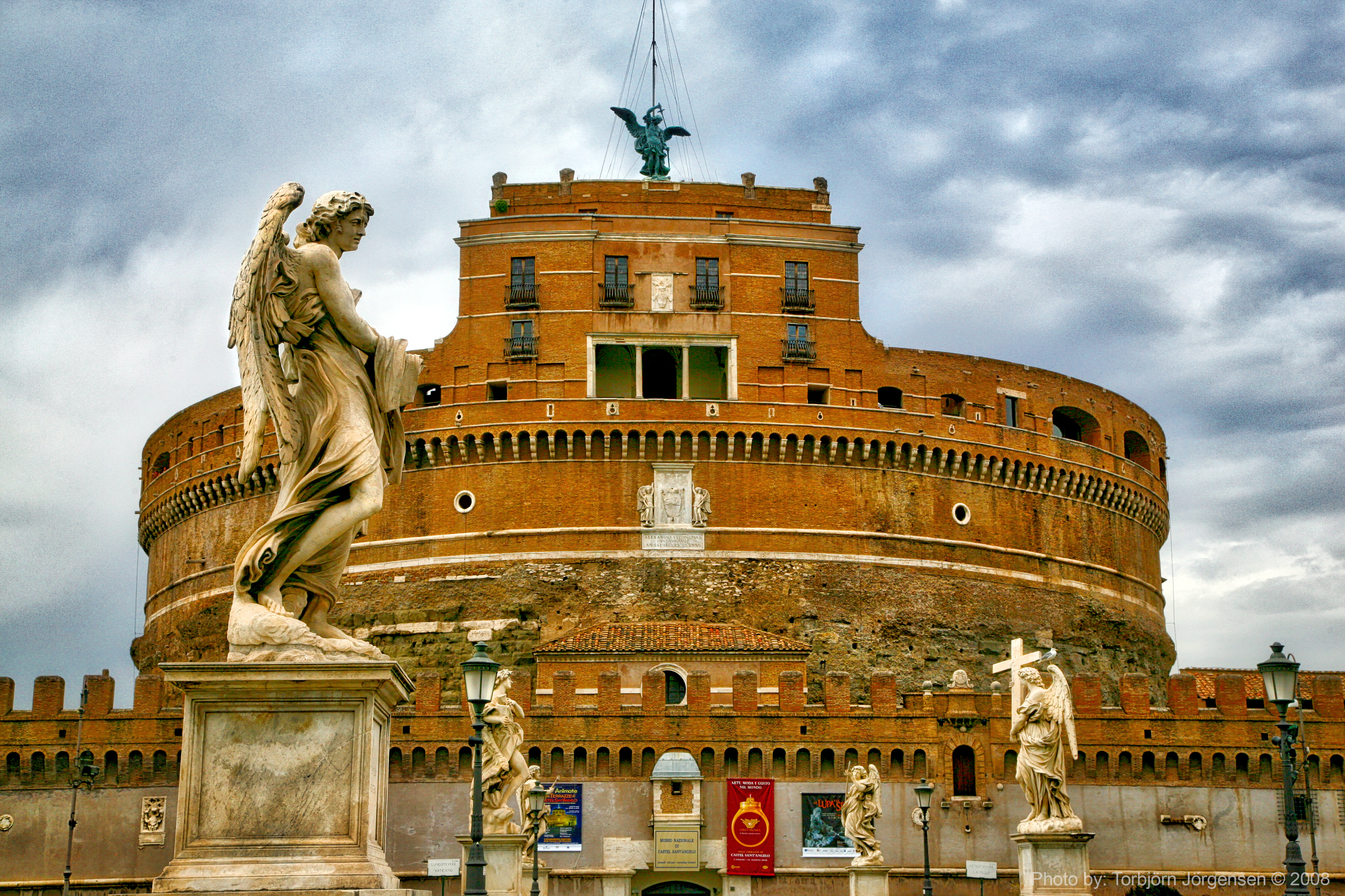 Castel Sant'Angelo, Rome